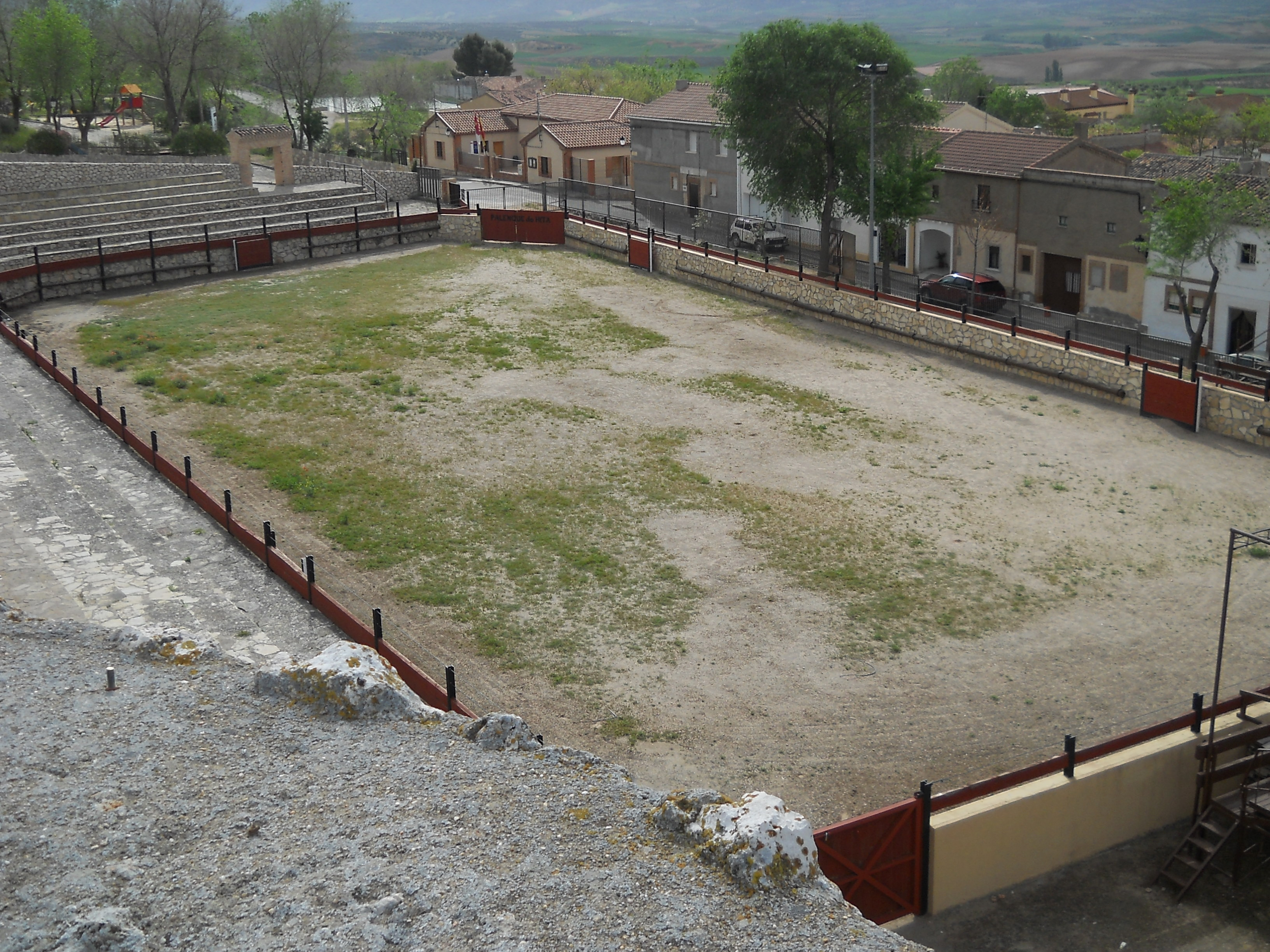 Palenque de Hita, Guadalajara, España